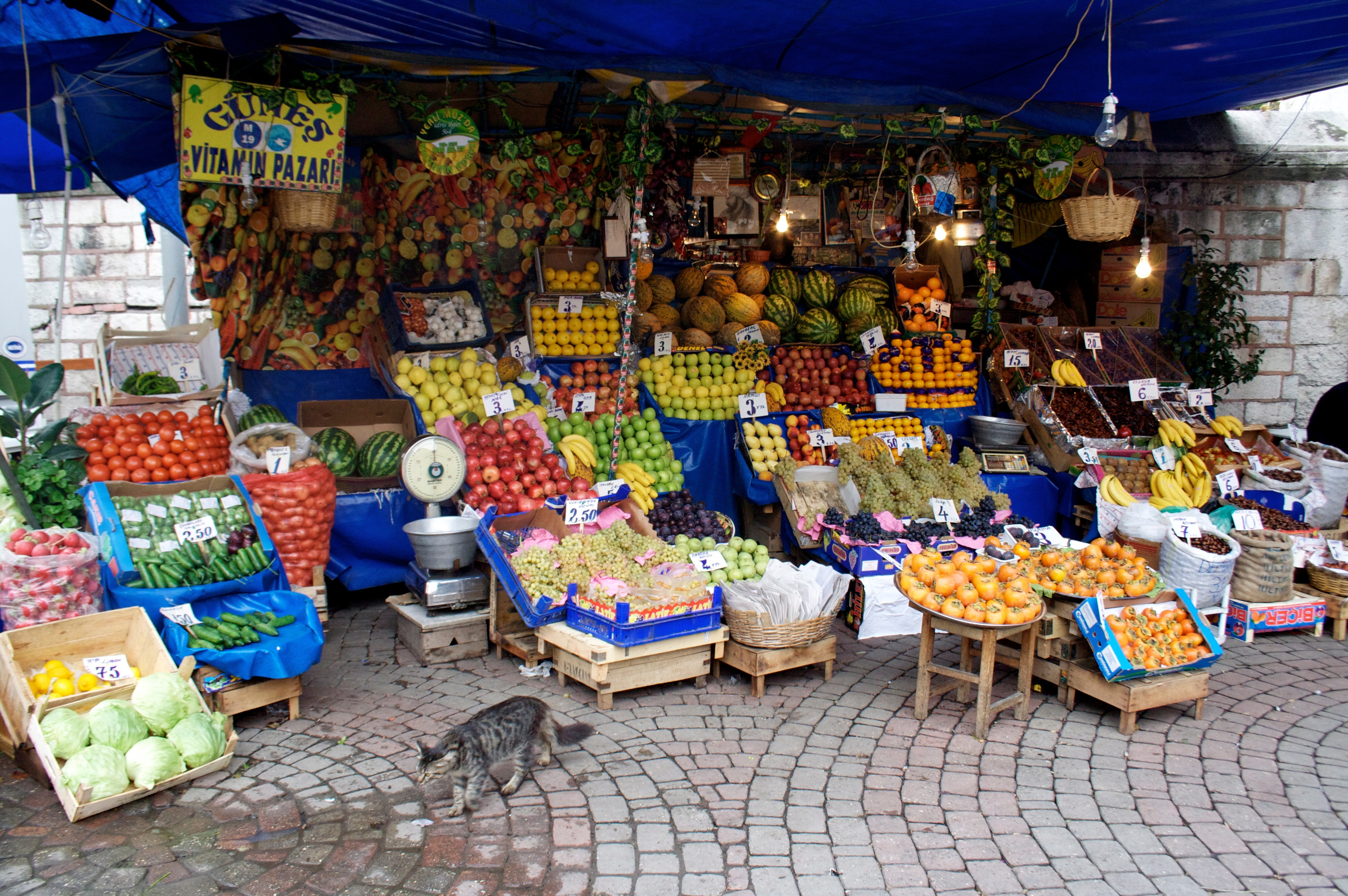 İstanbul'un Fatih ilçesinde Fatih Cami batı kapısı önündeki manav dükkanı